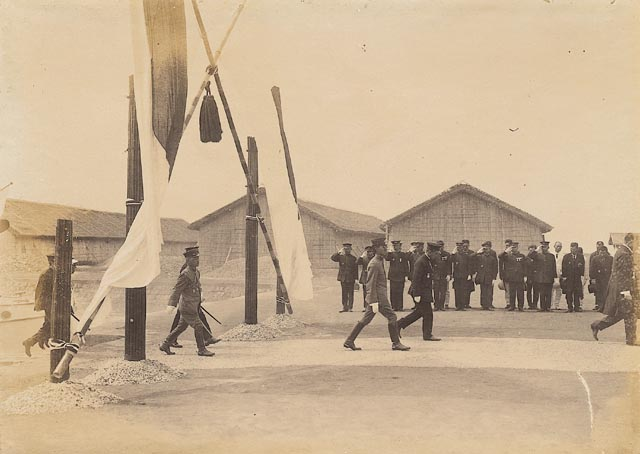 中文（台灣）: 日本裕仁太子於西元1923年（大正12年）抵台時，前往台南北門鹽田視察